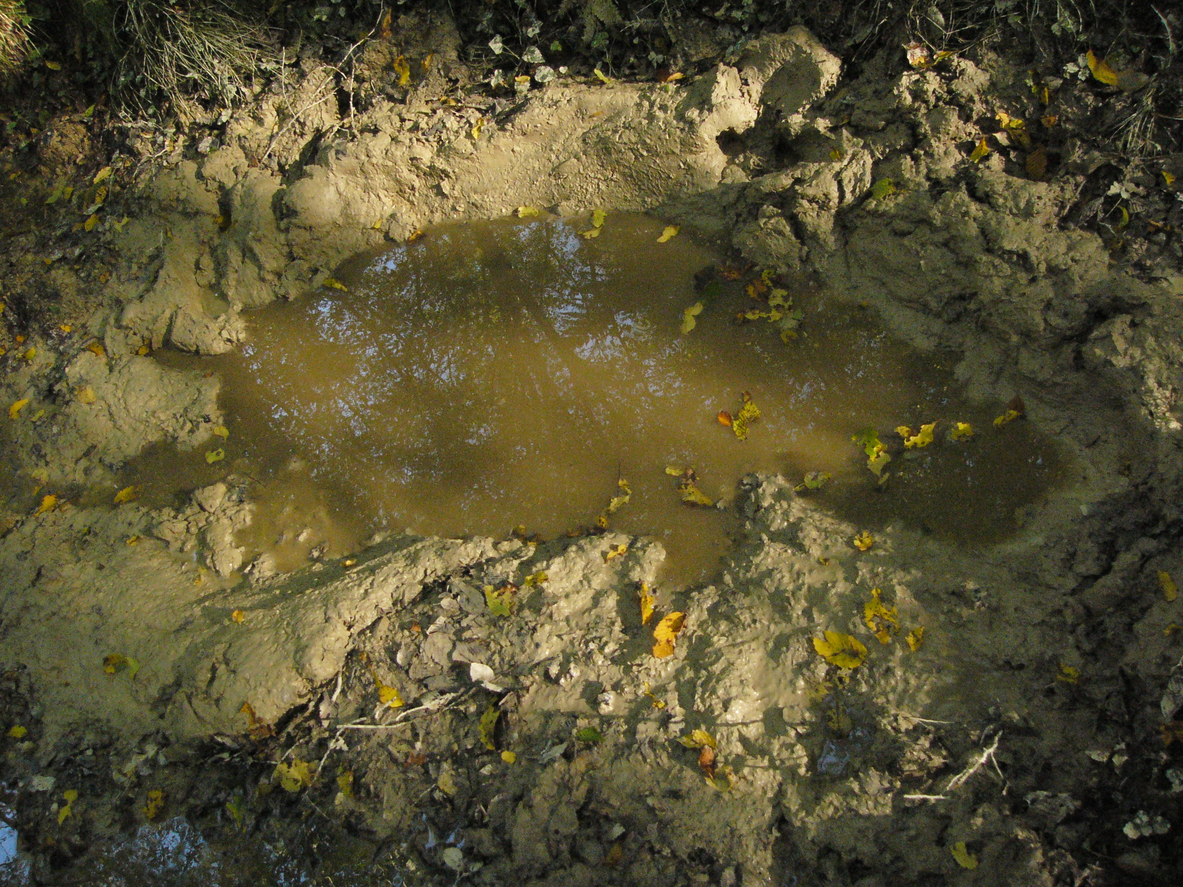 Souille de sanglier 27/10/2005 Auteur : Rv